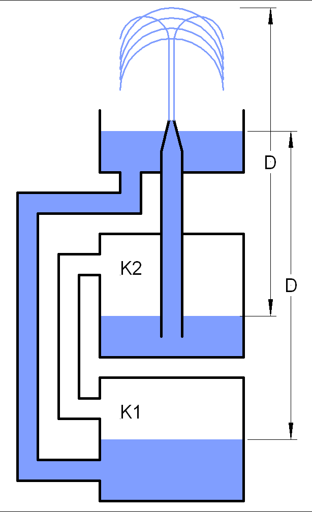 Heronsbrunnen